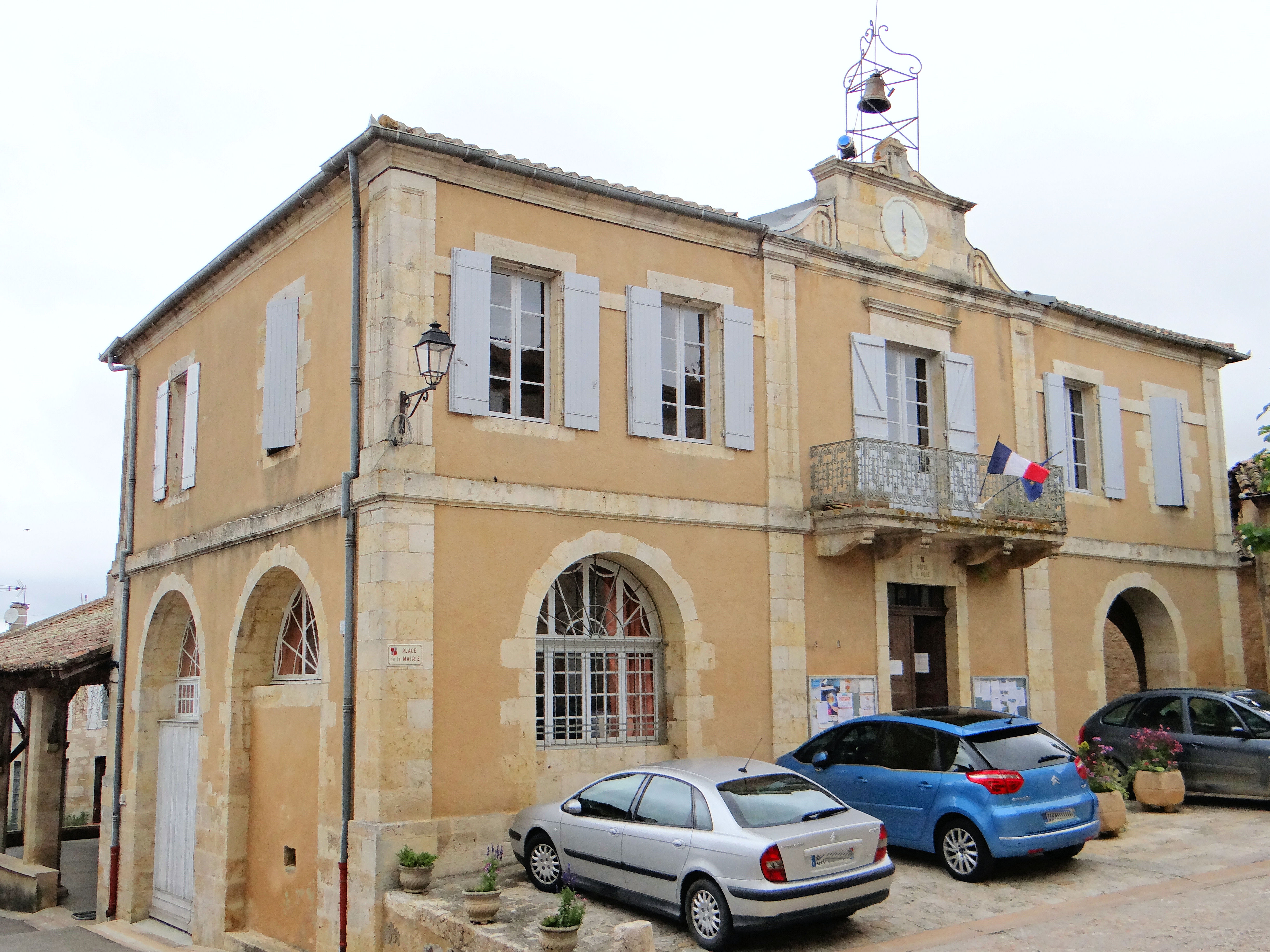 Miradoux - Mairie